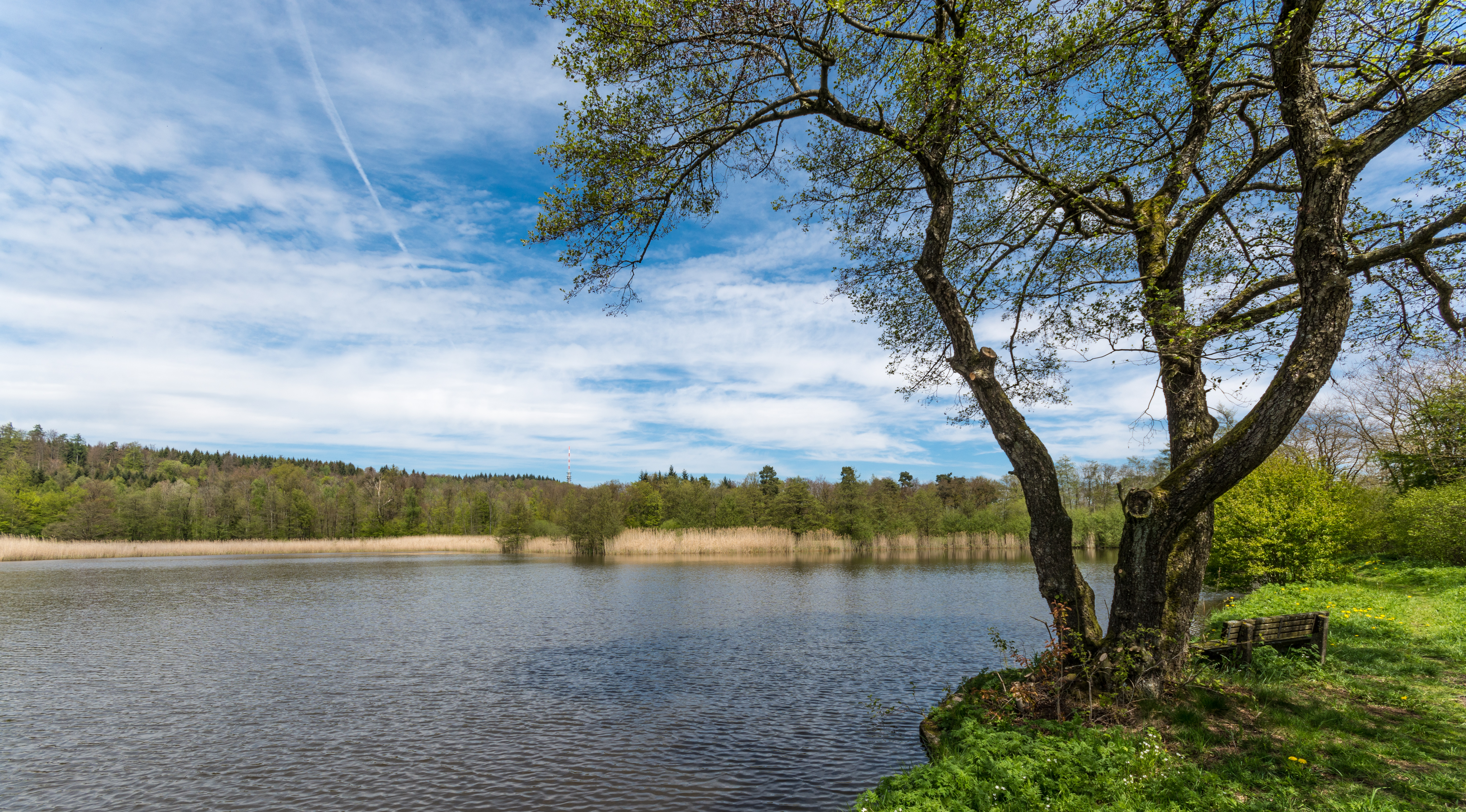 Rößlesmahdsee bei Waldenburg (Naturschutzgebiet Rößlesmahdsee mit Pfaffenklinge, Hohenlohekreis, Schutzgebiets-Nr. 1.110.)